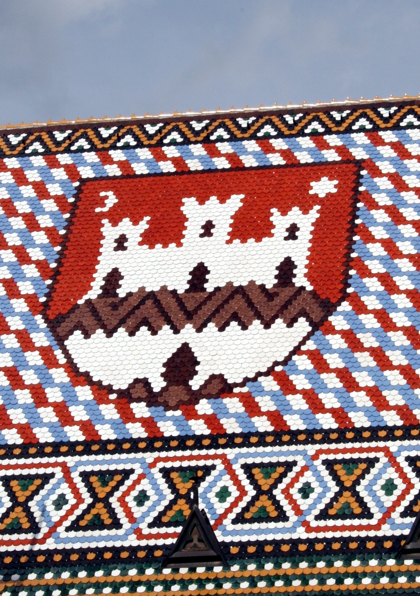 crkva sv. Marka, Zagreb